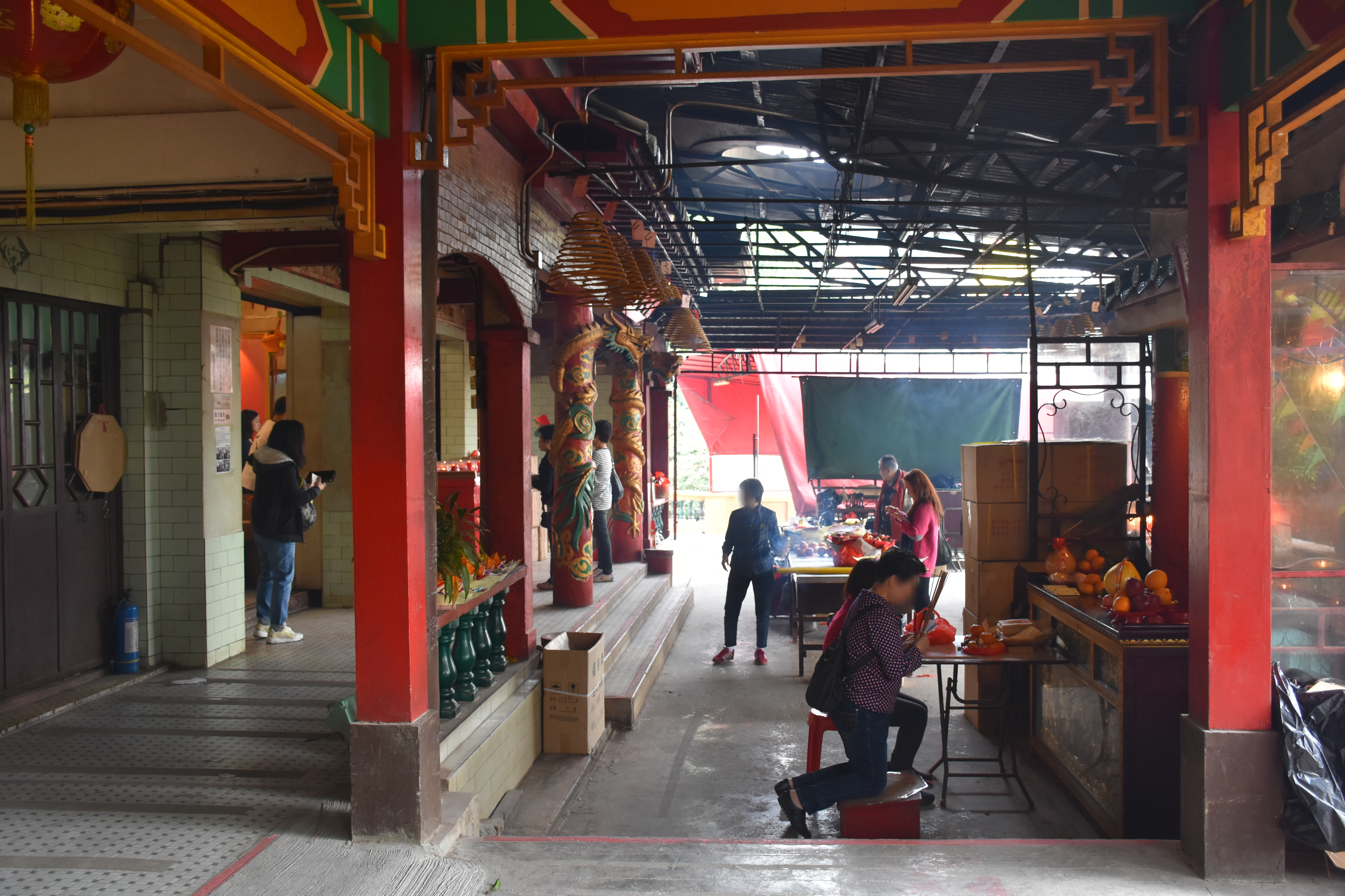 中文（香港）: 龍母佛堂主殿